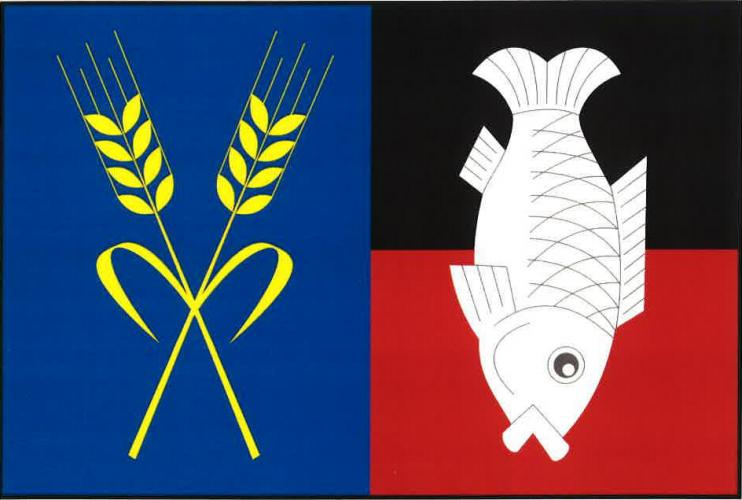 vlajka, Bousov, okres Chrudim